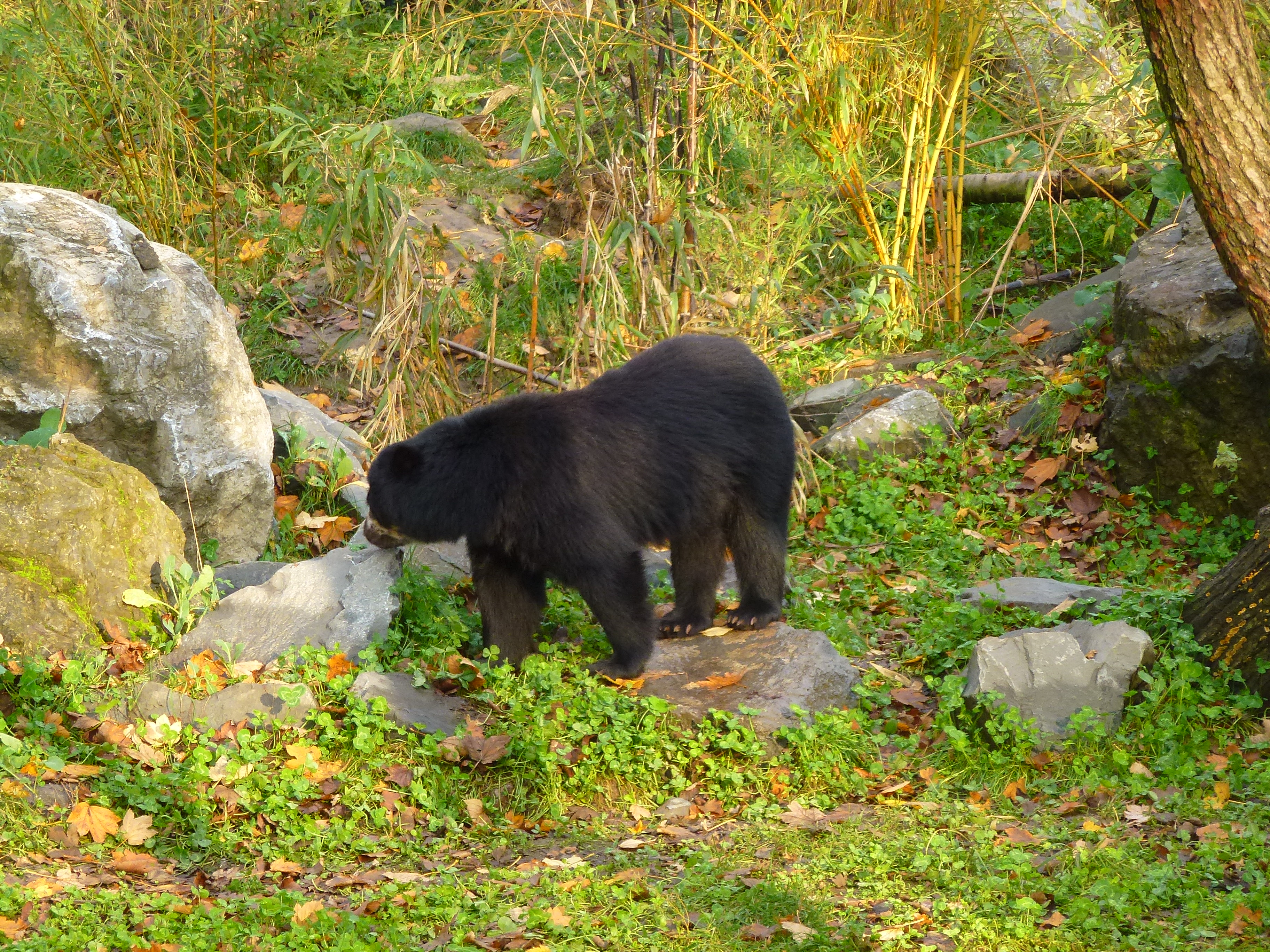 Brillenbär in der 2012 fertig gestellten Anlage des Duisburger Zoos